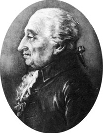 French botanist and agronomist Georges Louis Marie Dumont de Courset (1746-1824)